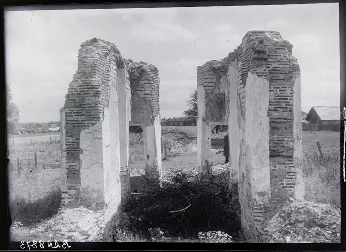 Беларуская (тарашкевіца): Полацак (Połacak), Бельчыца (Bielčyca). Манастыр Сьвятых Барыса і Глеба, царква Сьвятой Параскевы Пятніцы